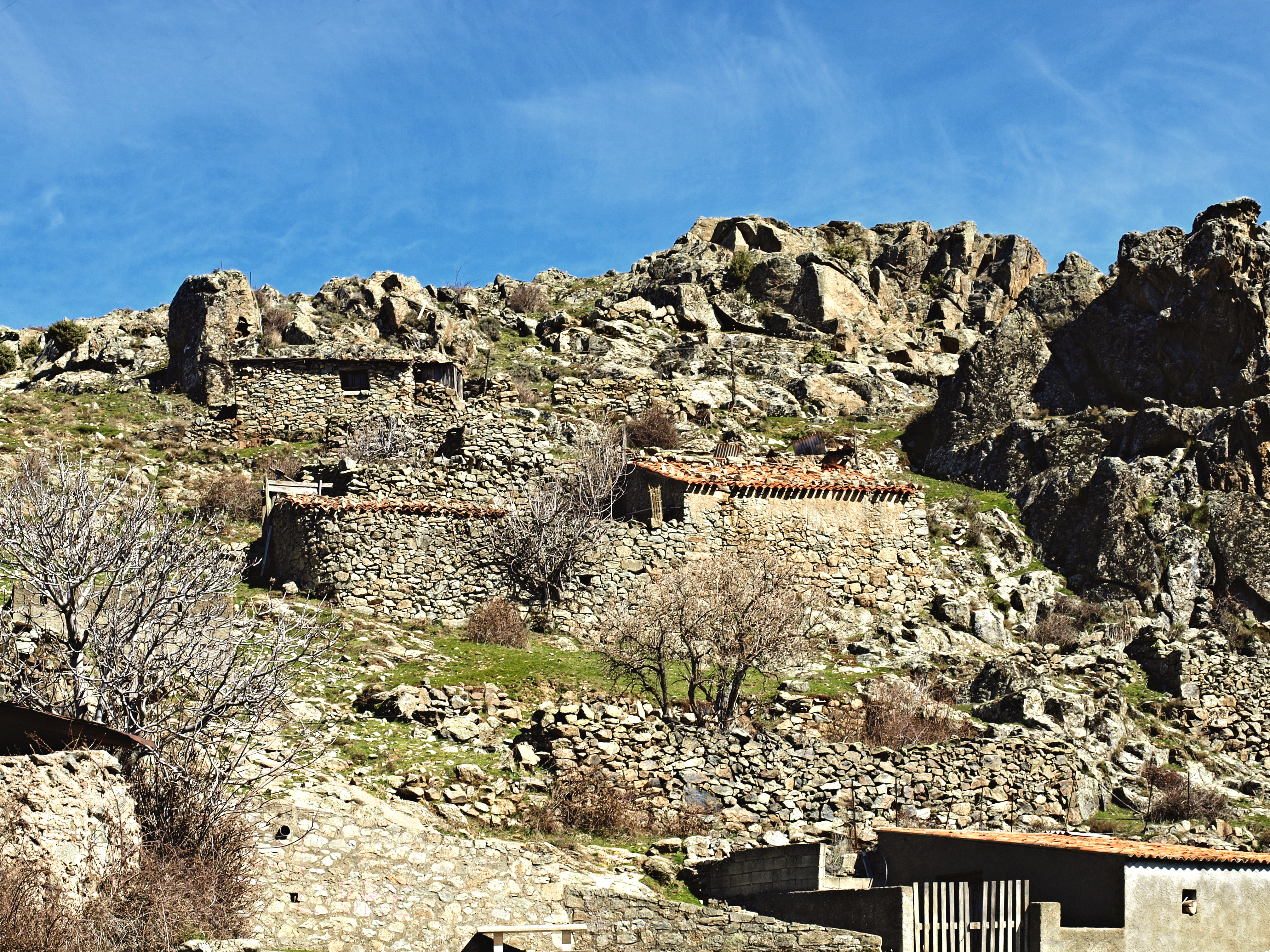 Corscia (Corsica) - Bergeries